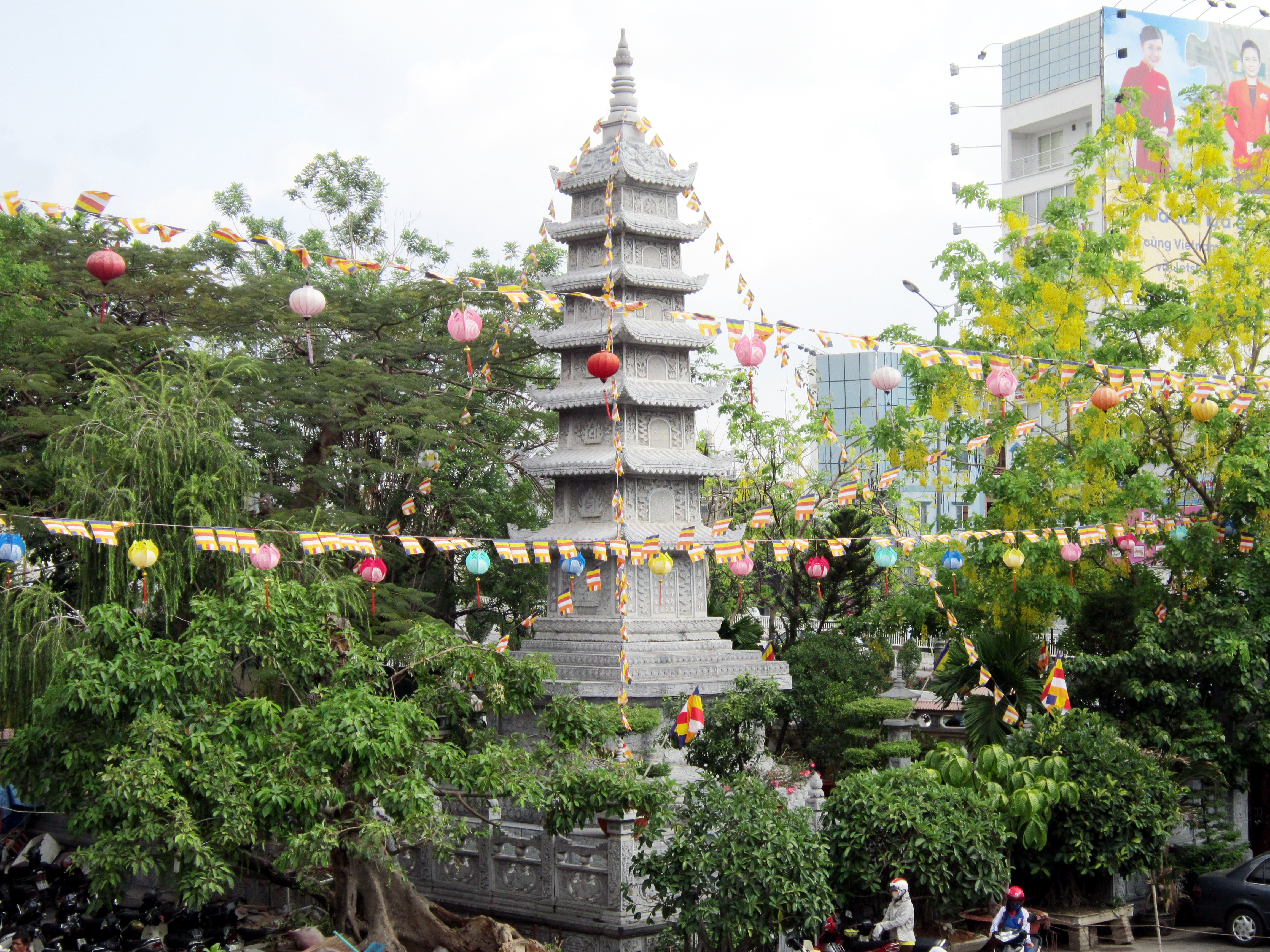 Tháp thờ cố đại lão Hoà thượng Thích Thanh Kiểm trong chùa Vĩnh Nghiêm, hiện tọa lạc tại số 339 Nam Kỳ Khởi Nghĩa, thuộc phường 7, quận 3, Thành phố Hồ Chí Minh, Việt Nam.